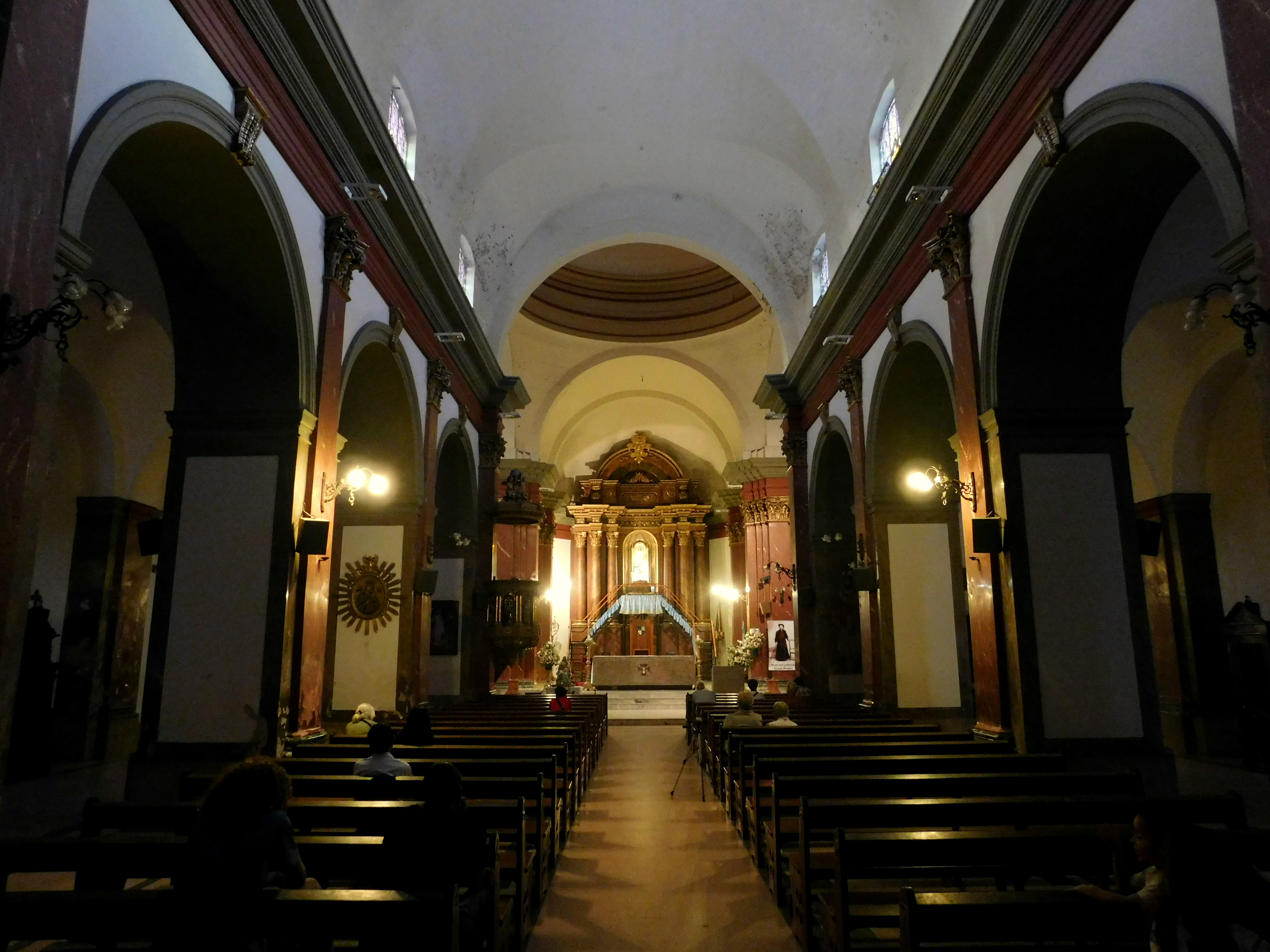 Interior de la Catedral Nuestra Señora de La Paz en Lomas de Zamora.